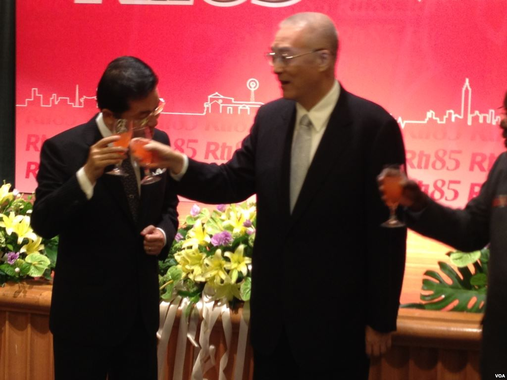 中華民國前副總統蕭萬長與副總統吳敦義出席中央廣播電臺85周年晚會。